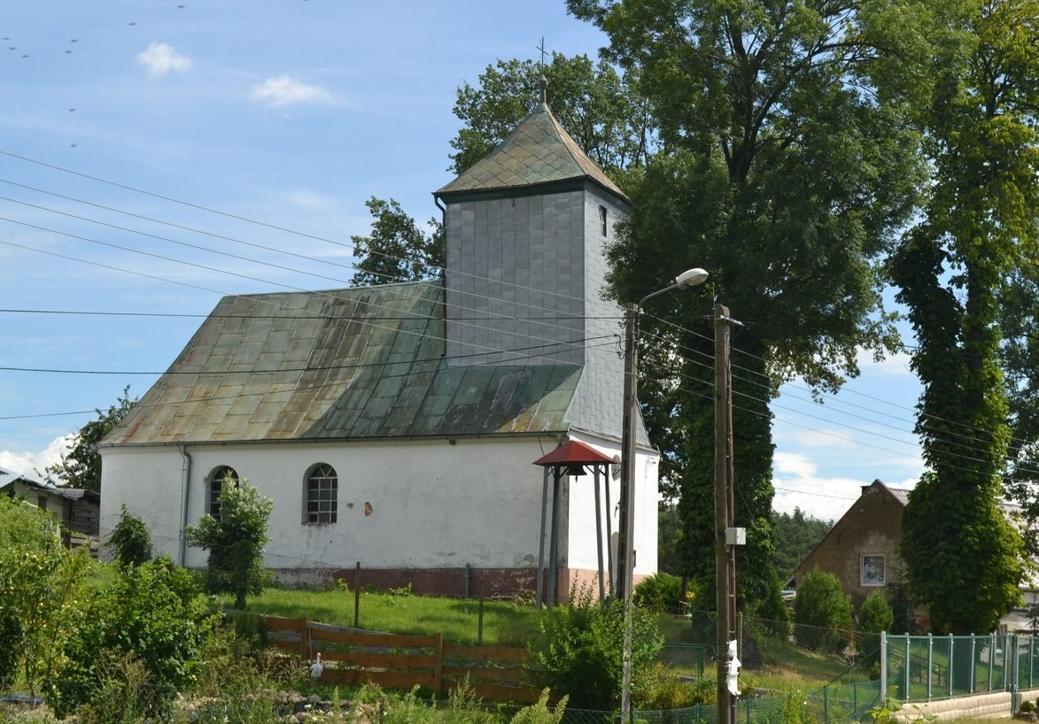 Bogdanów - rzymskokatolicki kościół filialny p.w. św. Stanisława Biskupa, pocz. XIX